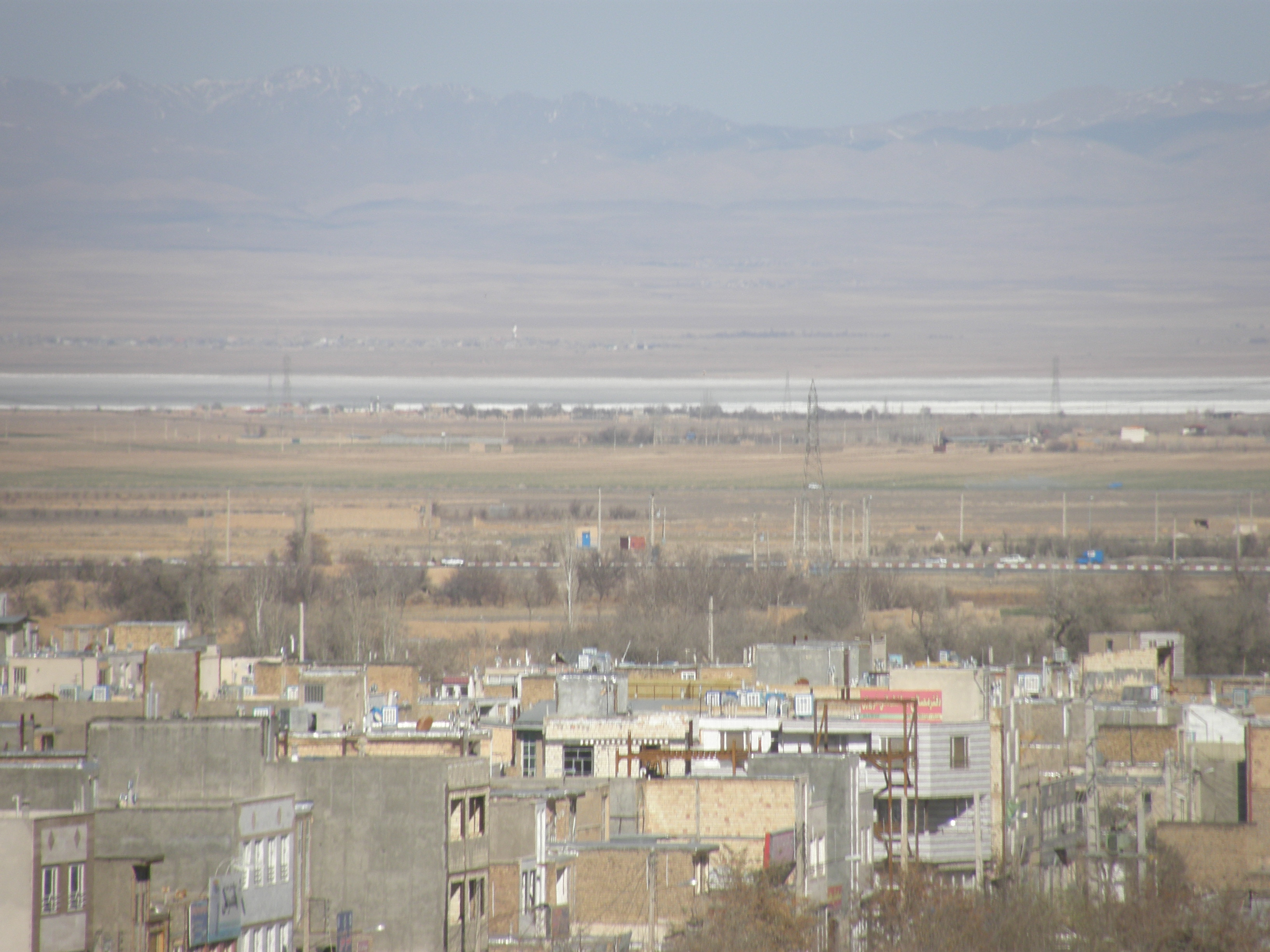 view of wetland from arak city